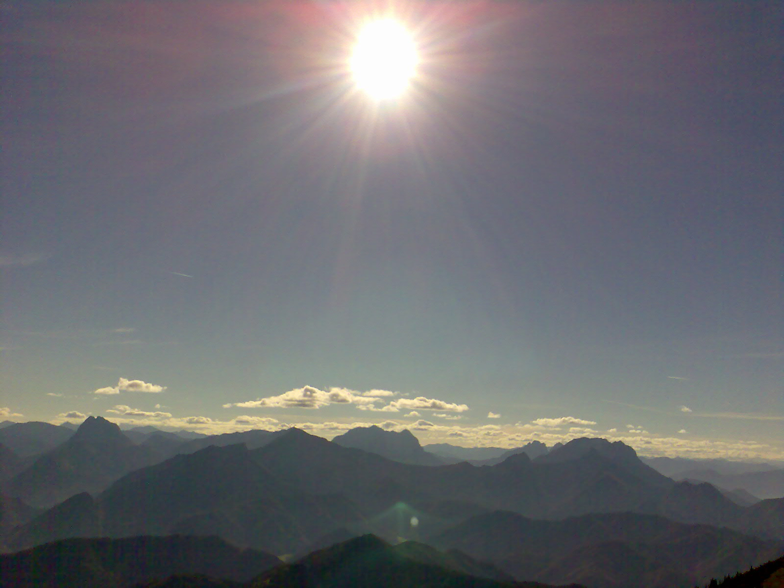 Blick von der Voralpe in die Bergwelt rund um Altenmarkt und ins Gesäuse (Ennstaler Alpen).